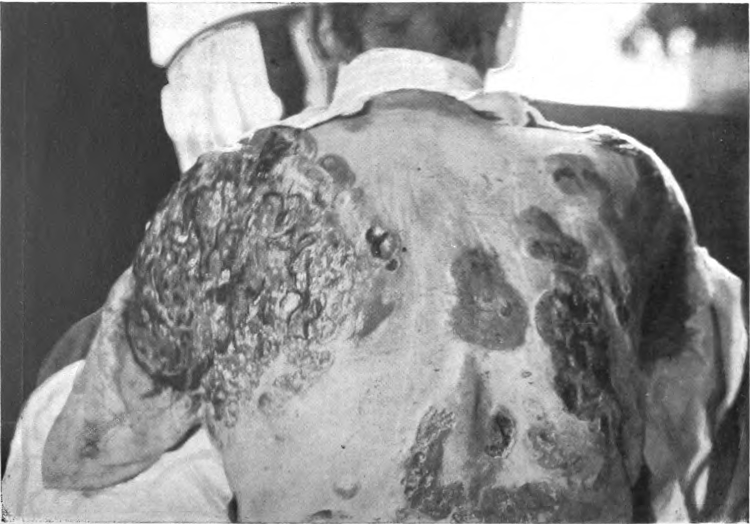 Mycosis Fungoides later stage